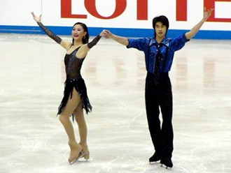 Yang Fang & Gao Chongbo at the 2003 NHK Trophy.